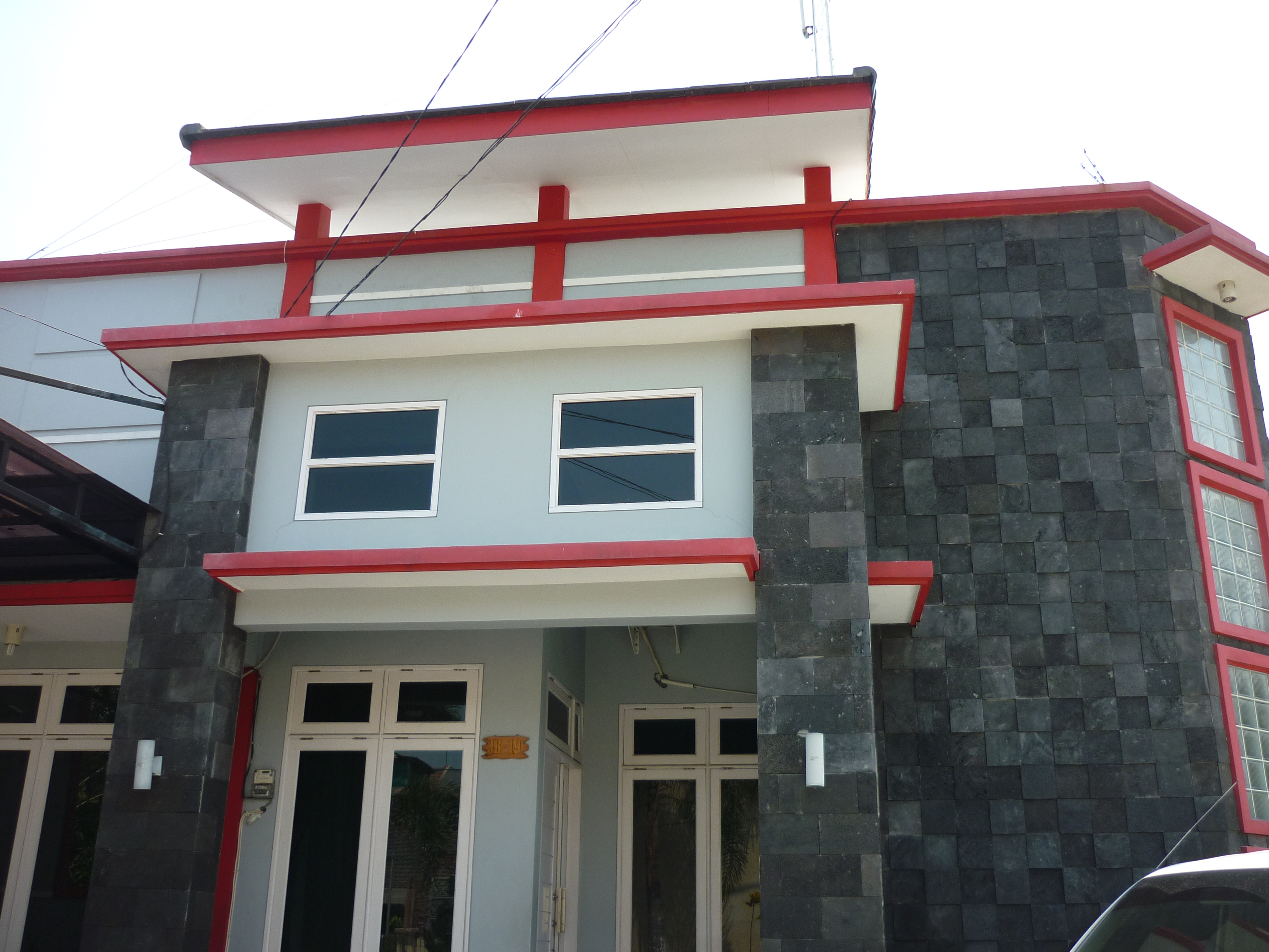 Sidokerto, Buduran, Sidoarjo Regency, East Java, Indonesia